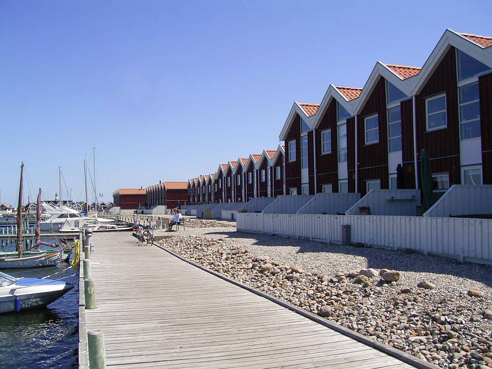 Nibe